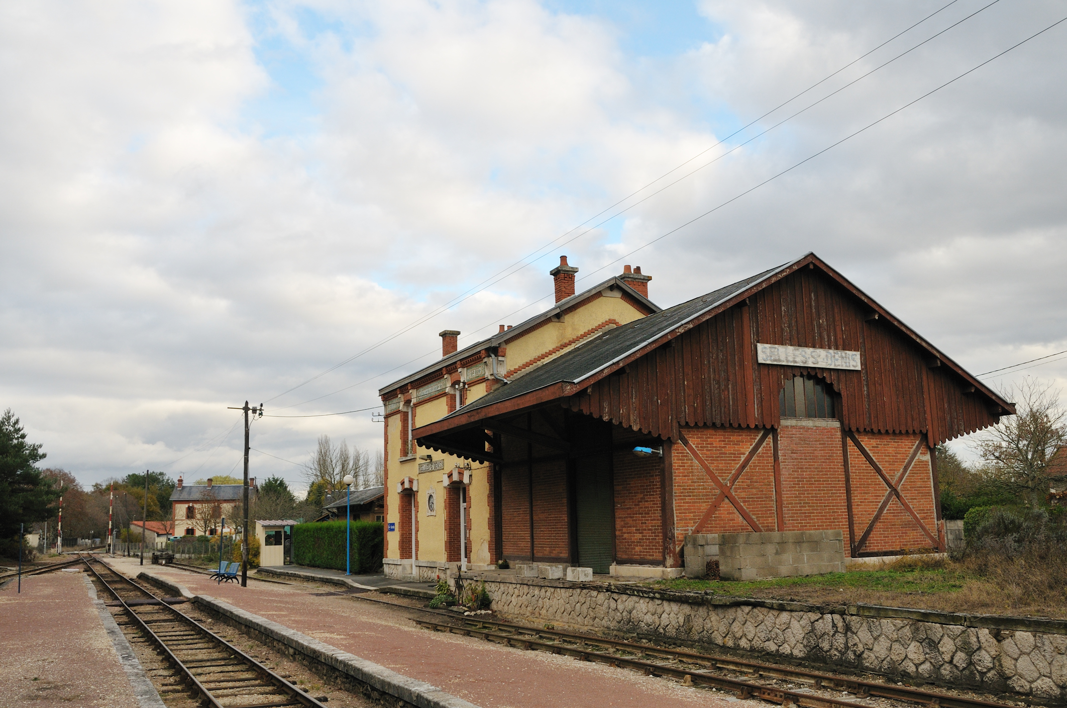 Gare de Selles-Saint-Denis, Loir-et-Cher, France